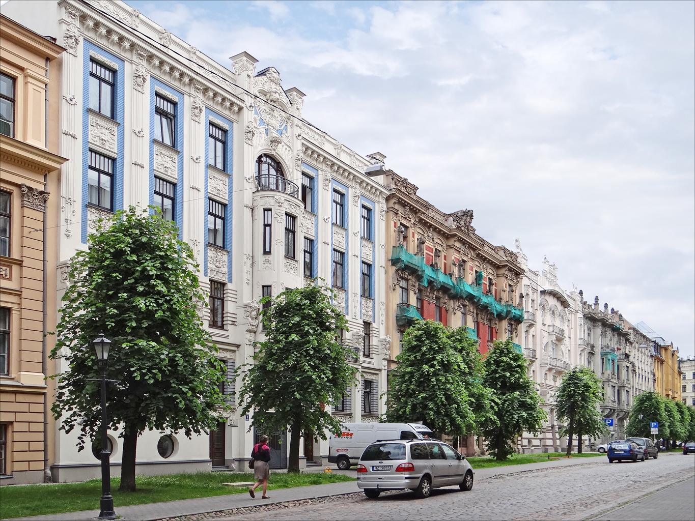 Ouverte entre 1901 et 1908, la rue Alberta concentre un grand nombre d'immeubles éclectiques et art nouveau. Plusieurs d'entre eux ont été conçus par l'architecte Mikhaïl Eisenstein. La rénovation des immeubles de ce quartier est très avancée et devrait être terminée d'ici à 2 ou 3 ans. Par contre, le système d'éclairage de la rue est une catastrophe esthétique avec des fils électriques qui dénaturent toutes les façades. On peut espérer que la ville de Riga et le ministère letton de la culture trouvent des solutions à ce problème et poursuivent leurs efforts pour mettre en valeur ce patrimoine exceptionnel, unique au monde. Les progrès accomplis en 20 ans d'indépendance (les premières élections libres ont eu lieu en 1993) sont néanmoins remarquables car le régime socialiste avait quasiment abandonné le patrimoine bâti comme partout dans les pays du bloc de l'est. _______________ Rīga, capitale de la Lettonie, est un parfait exemple de ville Art Nouveau. Son centre abrite la plus belle concentration de bâtiments Art nouveau au monde: plus d'un tiers d'entre eux appartiennent en effet à ce style. Cet ensemble architectural est inscrit sur la liste du Patrimoine mondial.... Extrait du site du réseau des villes art nouveau